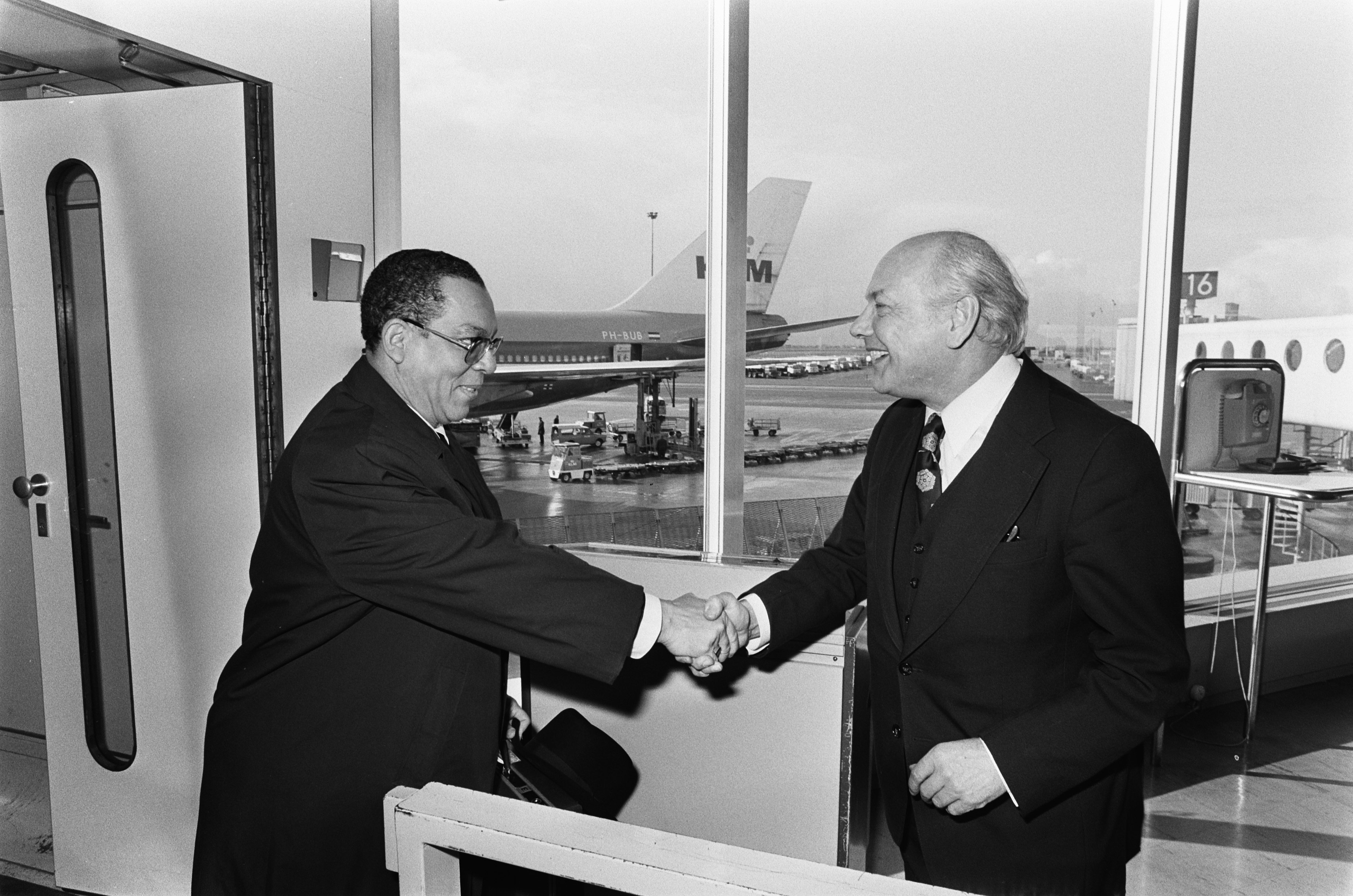 Collectie / Archief : Fotocollectie Anefo Reportage / Serie : [ onbekend ] Beschrijving : Aankomst premier Evertsz op Schiphol; begroeting door Den Uyl (r) Datum : 17 maart 1975 Locatie : Noord-Holland, Schiphol Trefwoorden : aankomsten, begroetingen Persoonsnaam : Juancho, Evertsz, Uyl, Joop den Fotograaf : Mieremet, Rob / Anefo Auteursrechthebbende : Nationaal Archief Materiaalsoort : Negatief (zwart/wit) Nummer archiefinventaris : bekijk toegang 2.24.01.05 Bestanddeelnummer : 927-8099